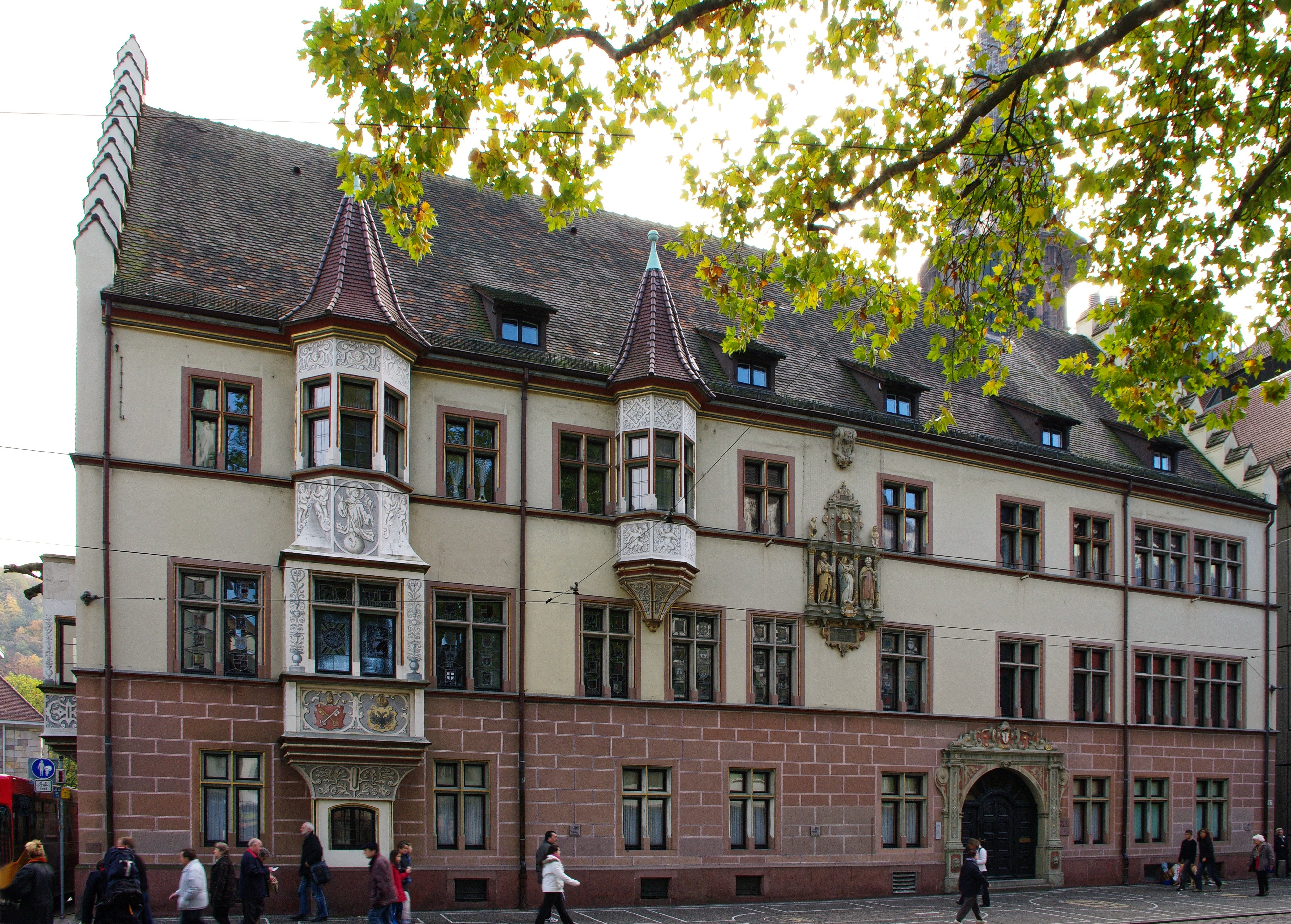 Gesamtansicht der Front des Basler Hofs an der Kaiser Josef Straße in Freiburg